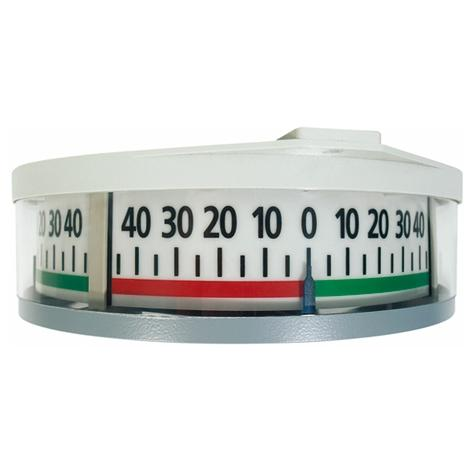 Indicador ángulo timón de buque mercante.